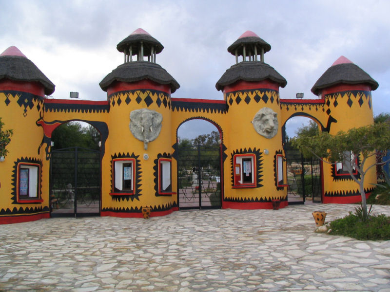 Friguia Park (entre Bouficha et Chgarnia) en Tunisie